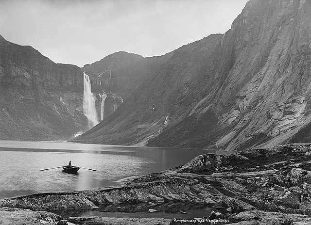 Ringedalsfossen fotografert frå Ringedalsvatnet